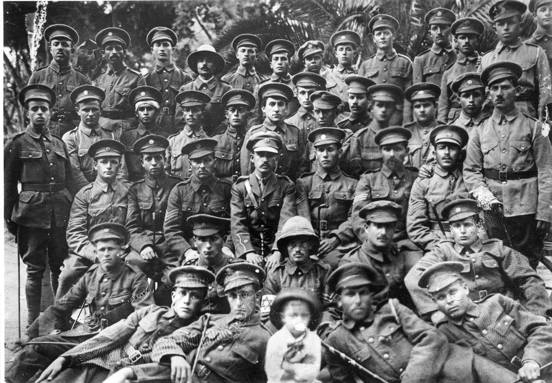 תצלום קבוצתי של נהגי הפרדות - מלחמת העולם הראשונה, גליפולי. , 1915